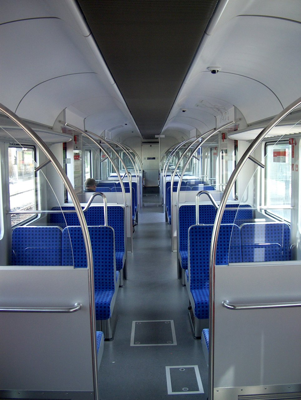 Innenraum eines S-Bahn-Zuges der DB-Baureihe 420, überarbeitet, der S-Bahn Stuttgart